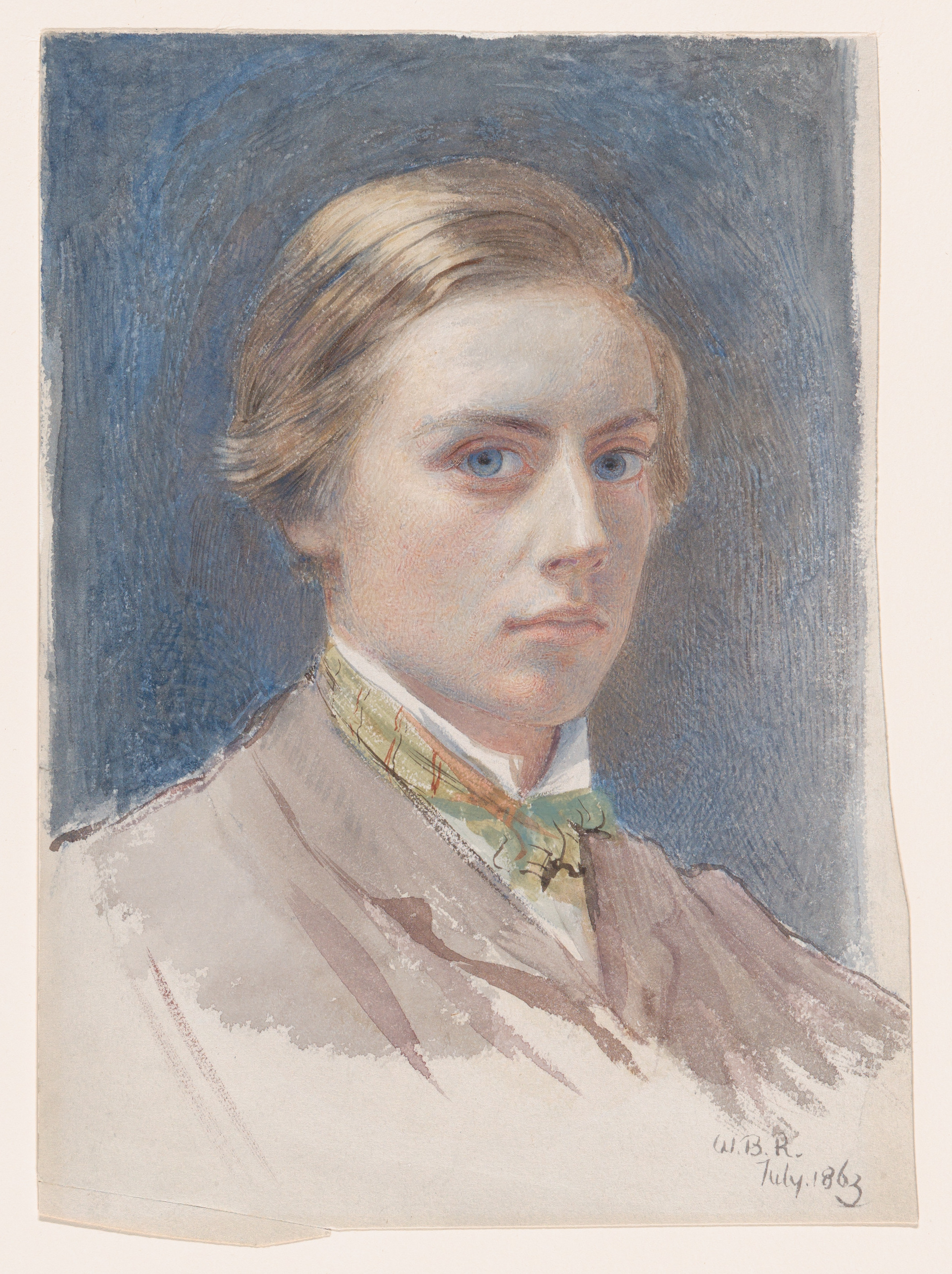 Drawing; Drawings